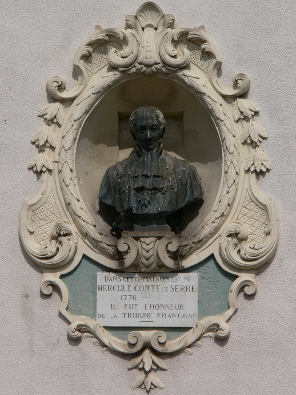 statue d'Hercule, comte de Serre, située à Pagny-sur-Moselle, Lorraine, France.